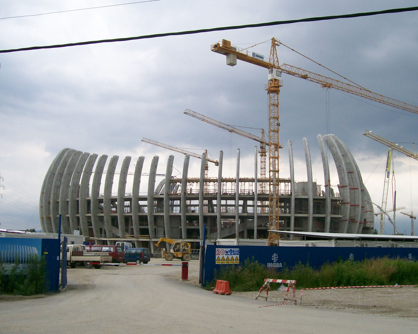 Arena Zagreb tijekom gradnje u lipnju 2008.